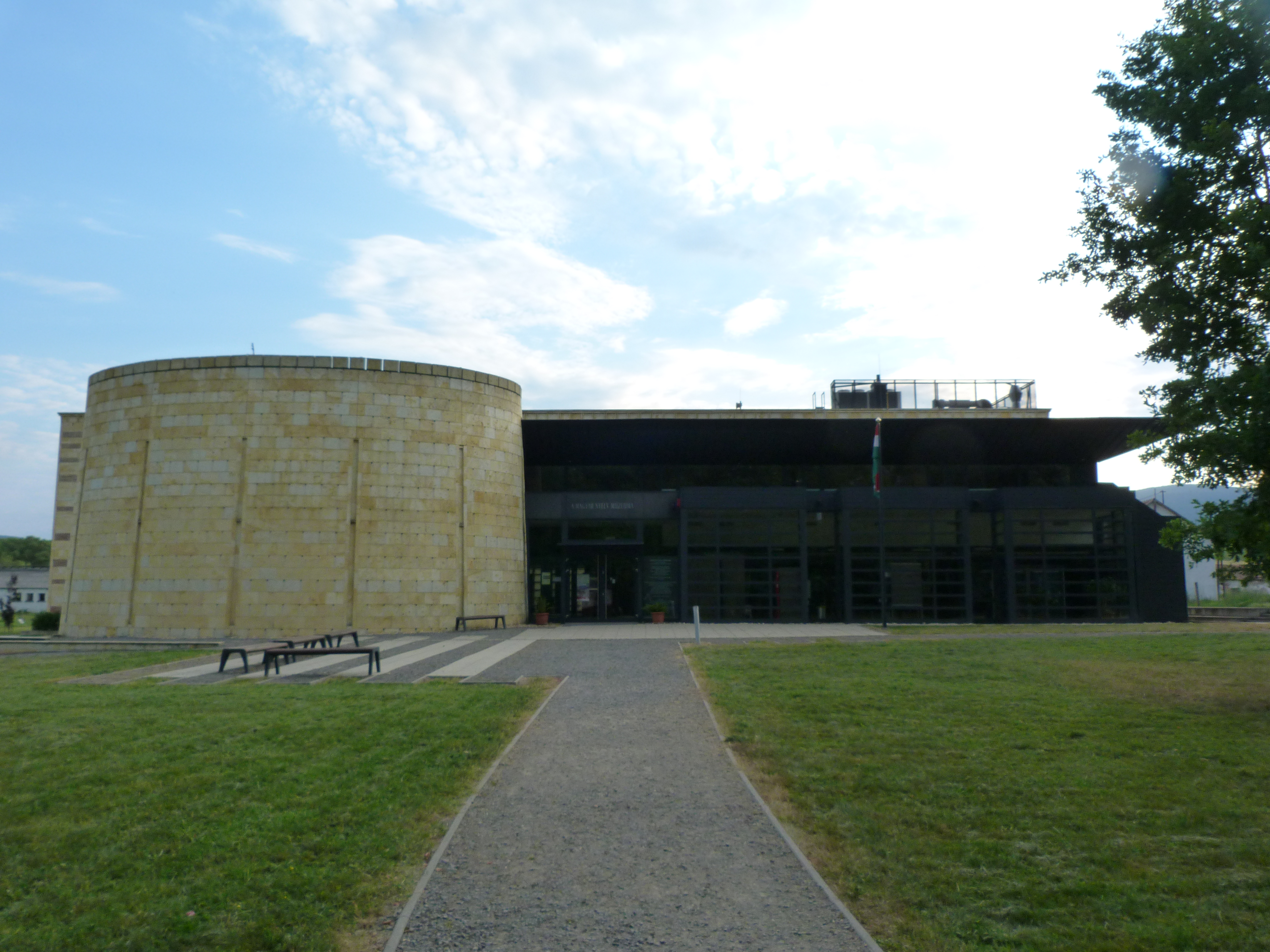 A felvétel 2014. június 19-én, csütörtökön készült Széphalmon.